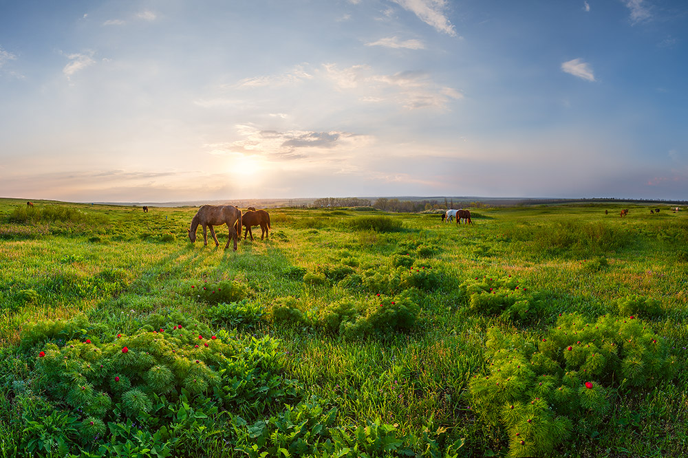 Хомуто́вський степ — відділ Українського державного степового заповідника